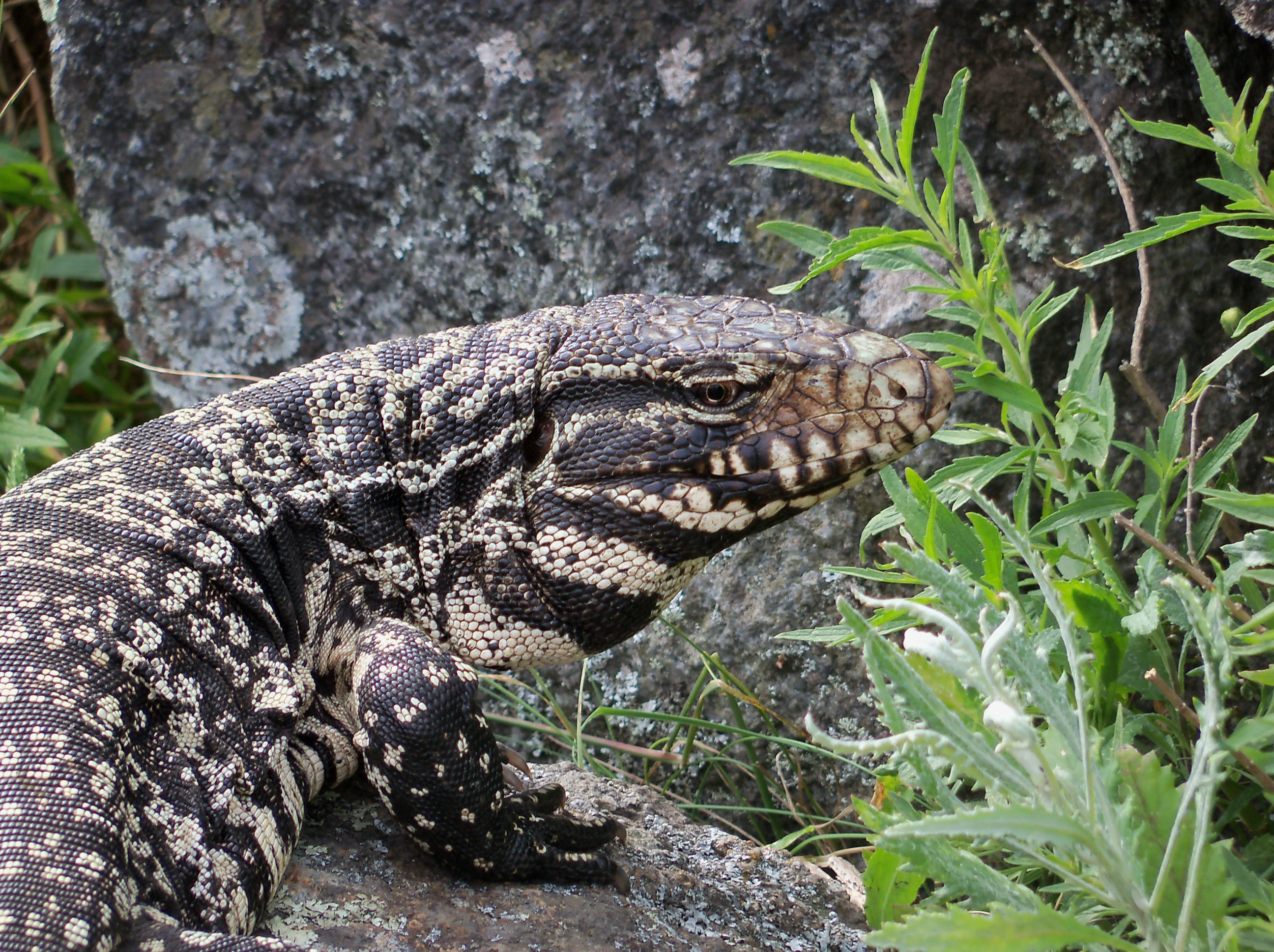 Lagarto overo en Tandil.